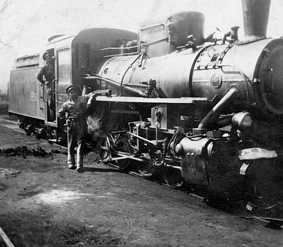 MÁVAG KV-4 sorozatú mozdony. Tags: steam locomotive, railway, MÁVAG-brand, Hungarian brand, narrow-gauge railway Title: MÁVAG KV-4 sorozatú mozdony.